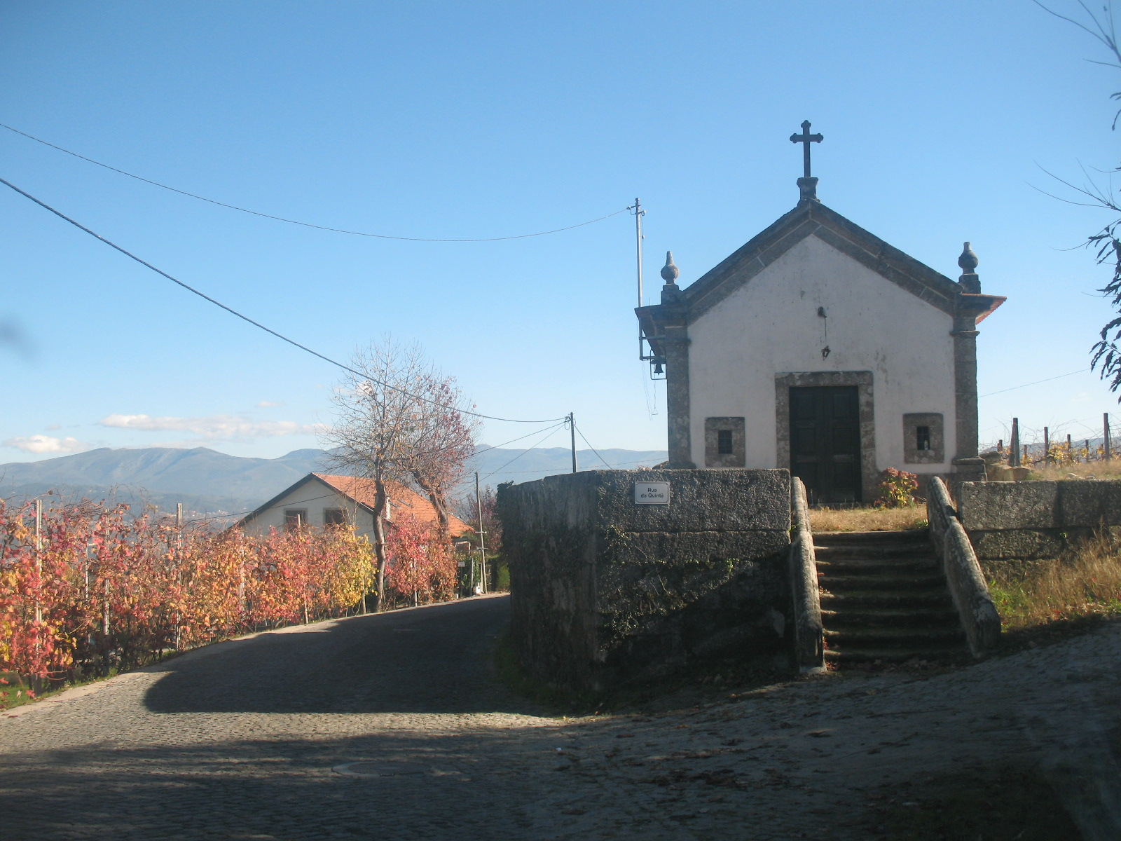 Amarante Fregim Capela da Quintã